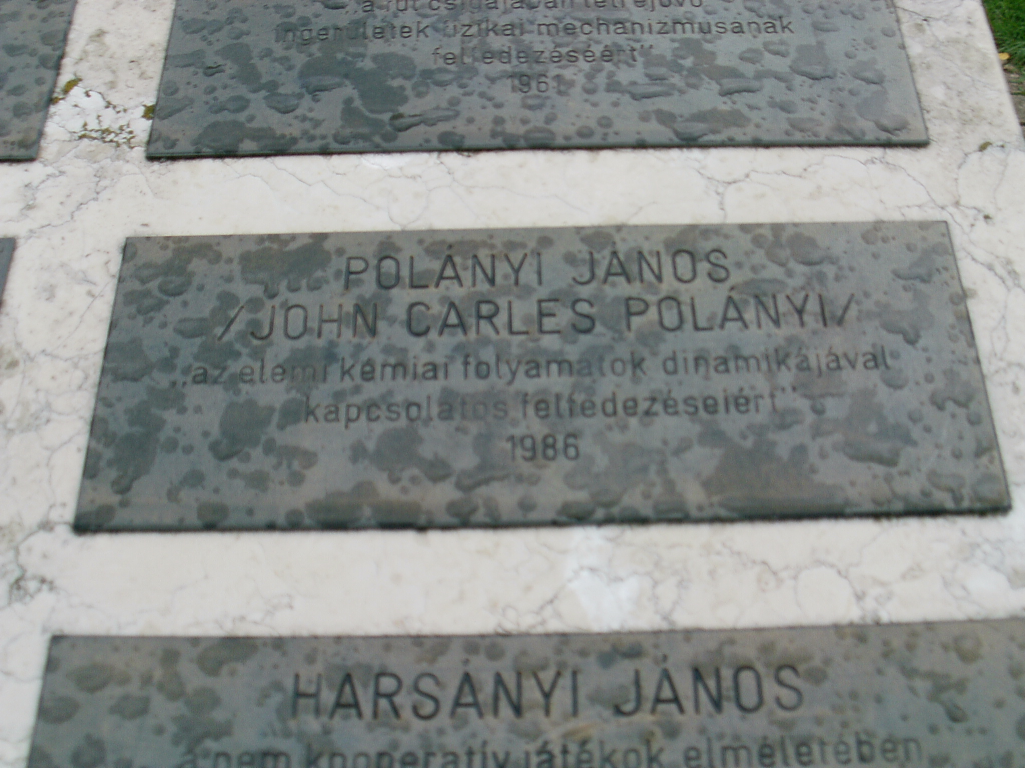 Polányi János emléktáblája Egerben